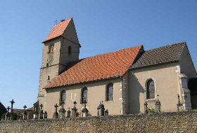 Église de Grosne (Territoire de Belfort) Photo prise le 3 mai 2004 par LP90 Licence GFDL LP90 mai 2004